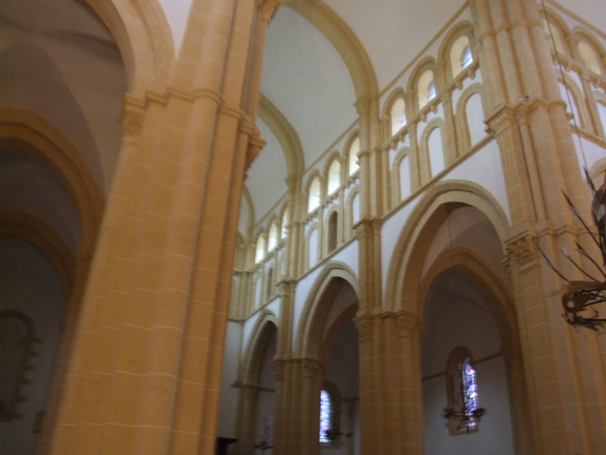 Nef de la basilique de Paray-le-Monial, Saône-et-Loire, Bourgogne, France